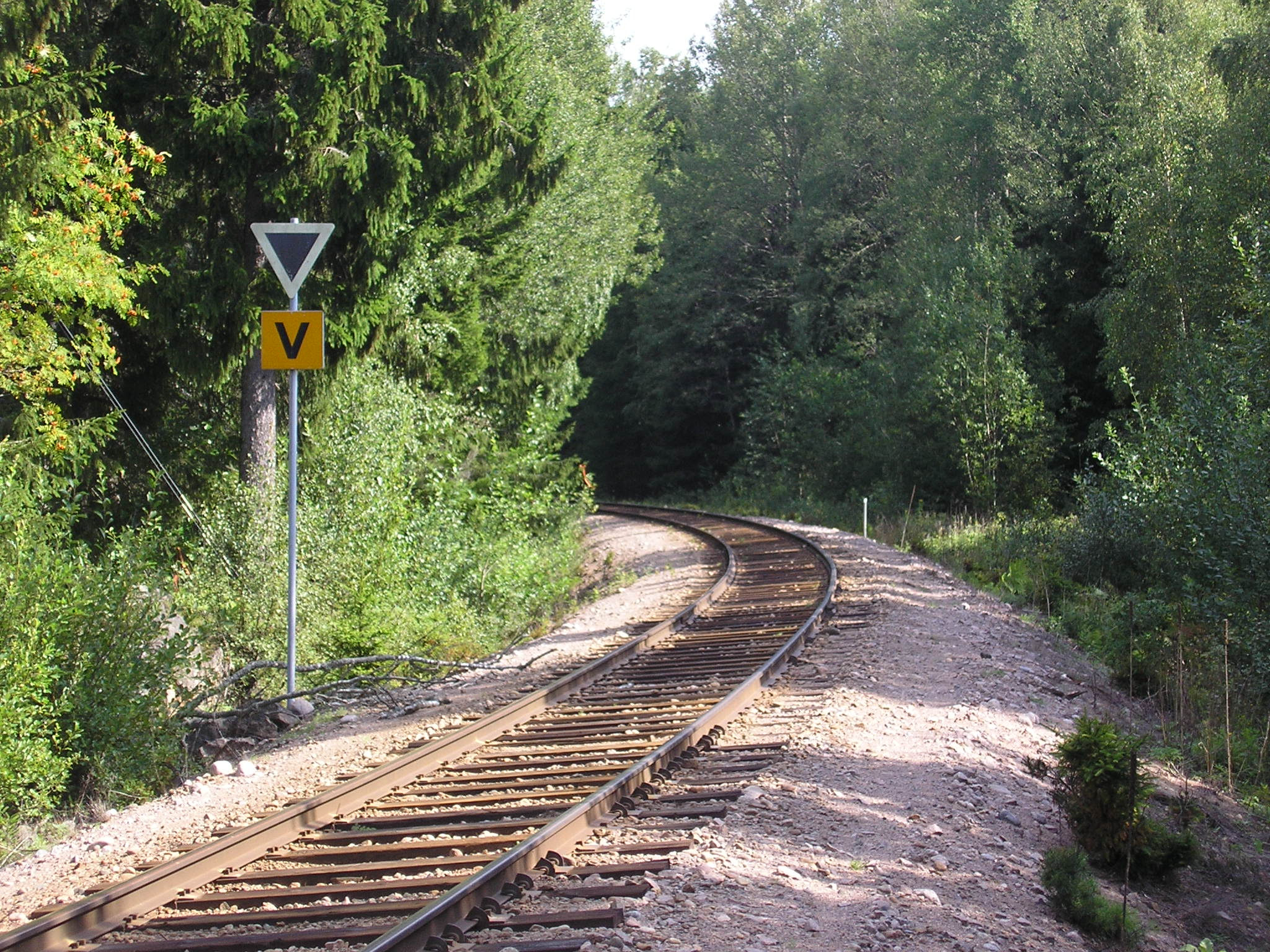 Kinnekullebanan strax norr om Lyrestad.